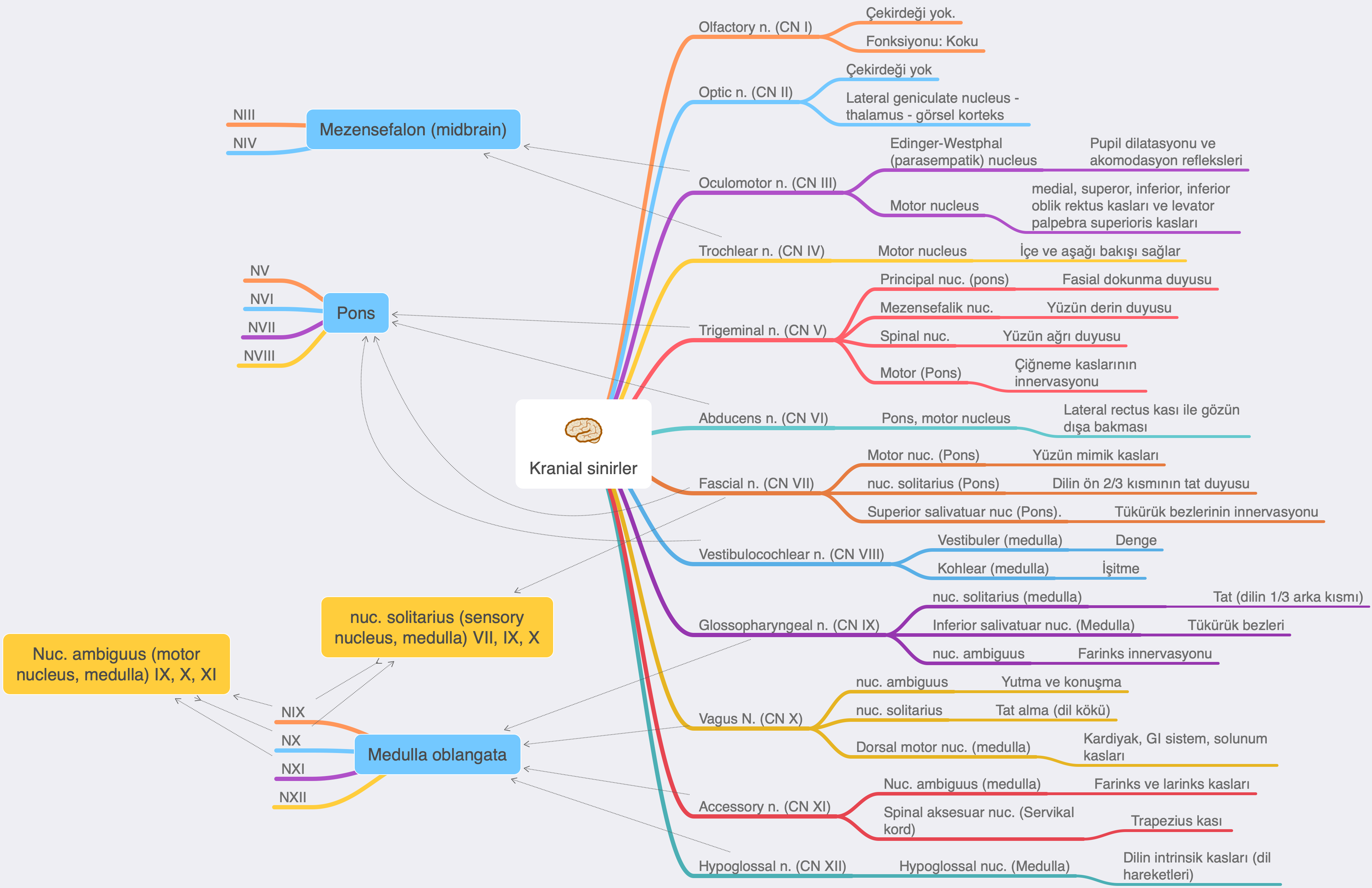 12 çift kranial sinirin fonksiyonlarına göre şematize gösterimi